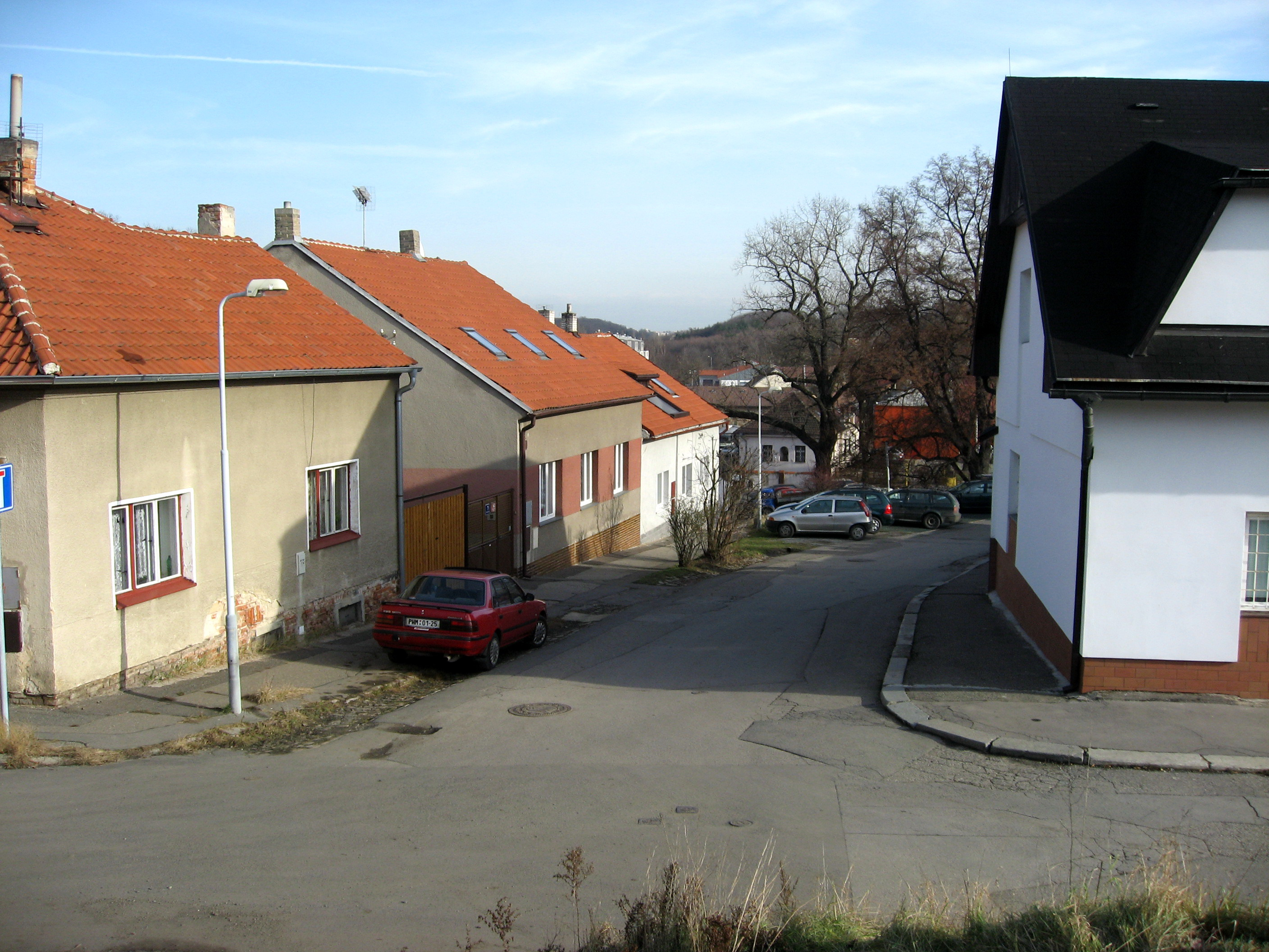 Hrdlořezy, Hrdlořezská, spojka z Horní Hrdlořezské (vlevo dům č. 43/7).